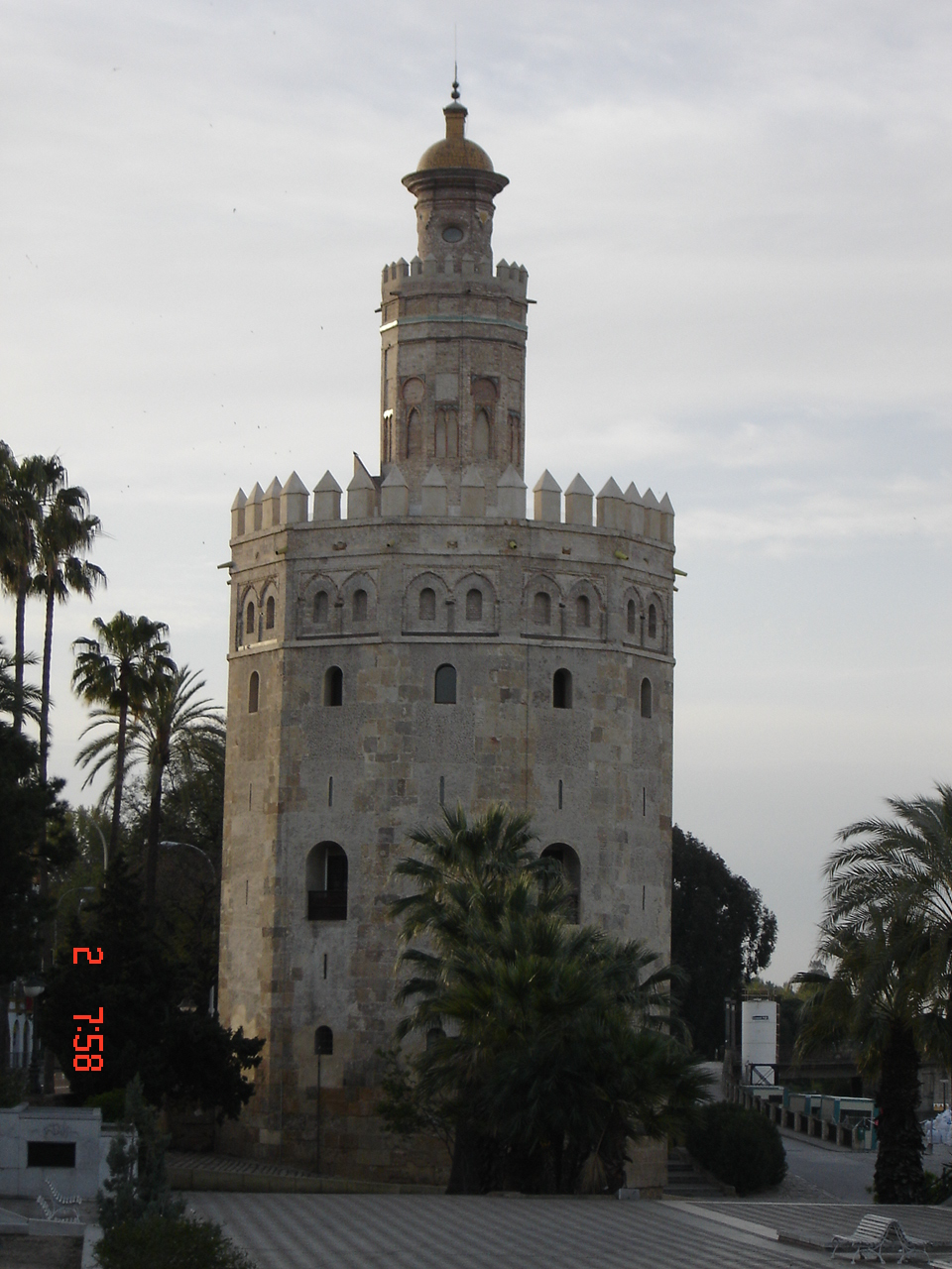 Torre del Oro.